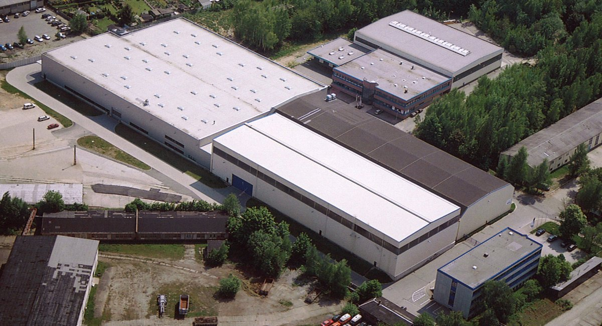 Luftbild der ThyssenKrupp Presta Chemnitz GmbH